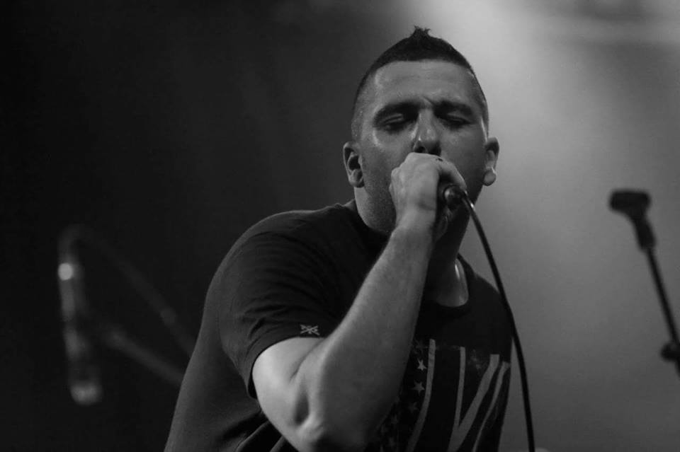 אורן ג'ורנו